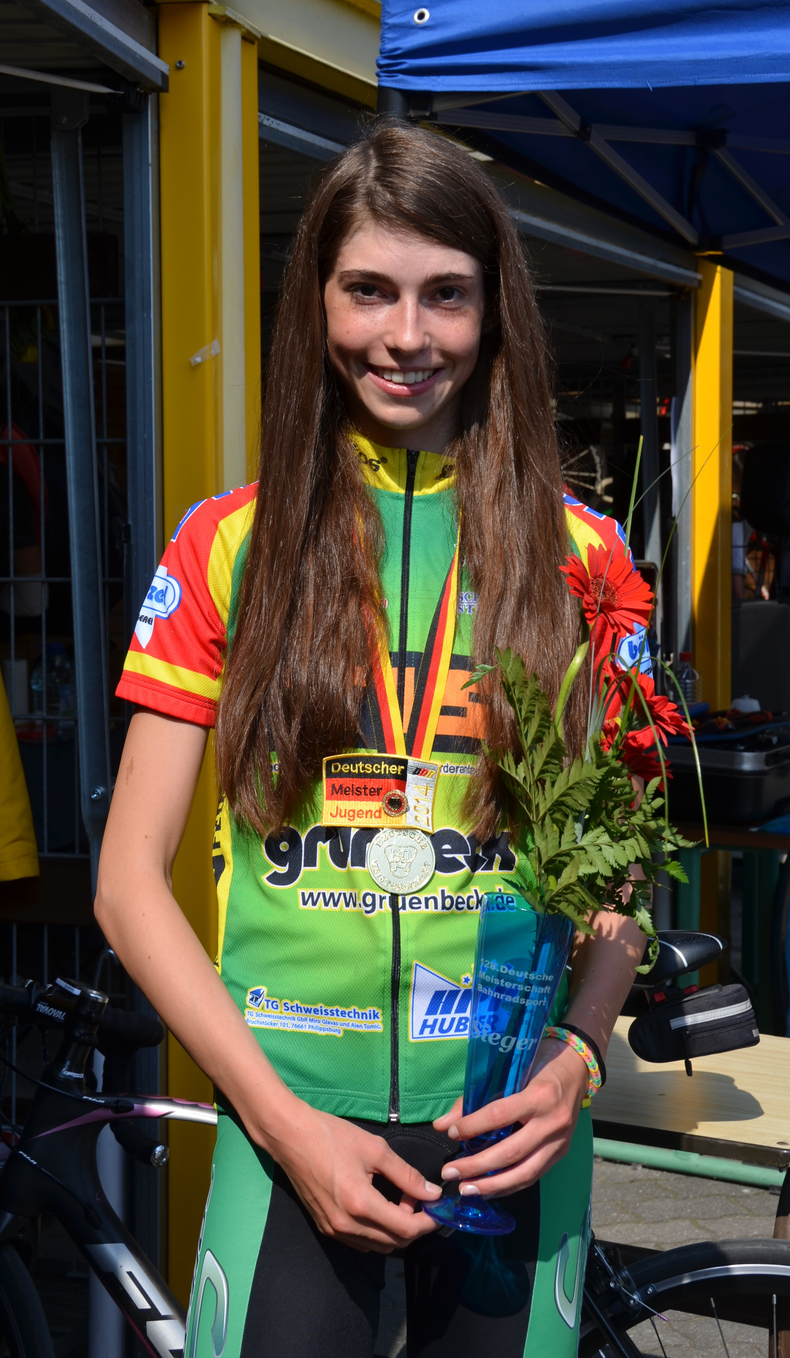 The making of this document was supported by the Community-Budget of Wikimedia Germany. Christa Riffel, deutsche Radsportlerin